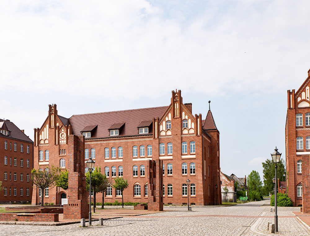 Stendal Scharnhorststraße 42, Arbeitsgericht Stendal, Baudenkmal